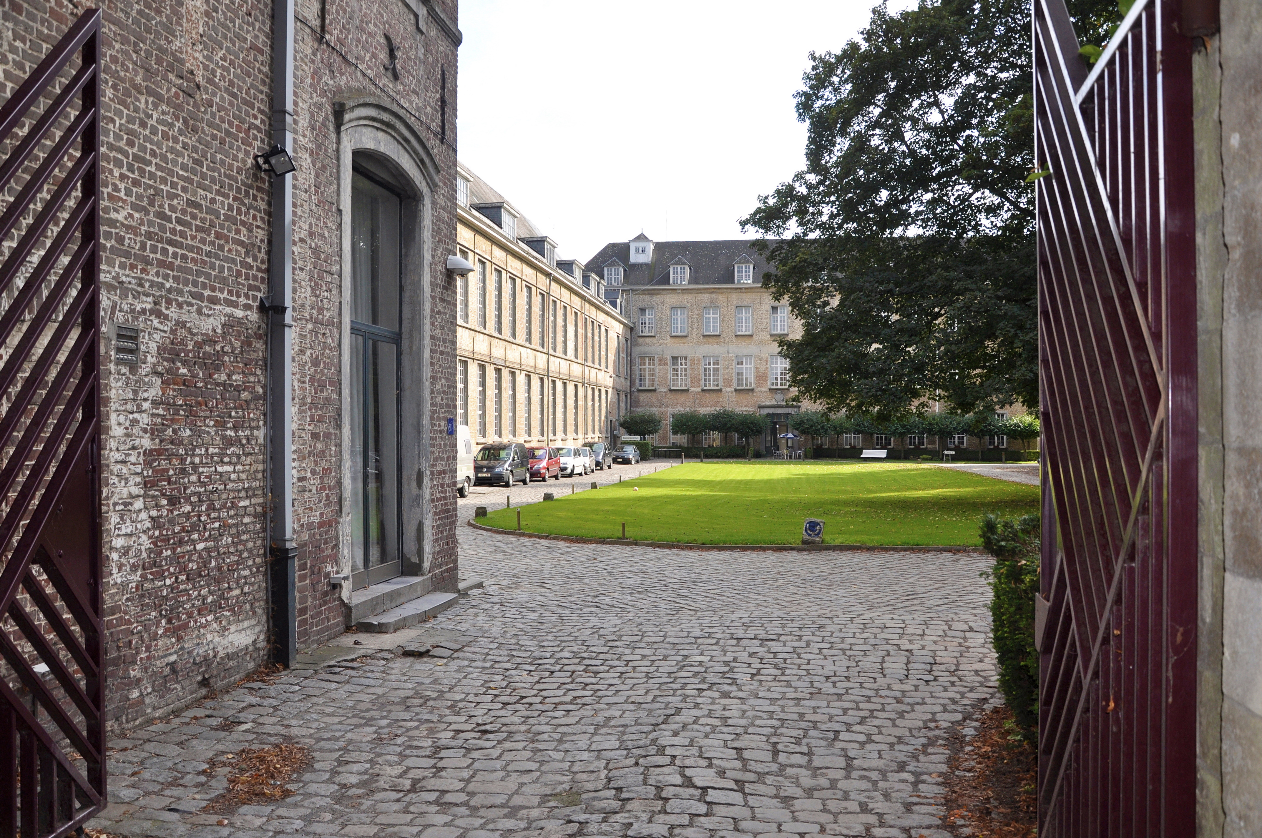 Abdij van Drongen, te Drongen, België